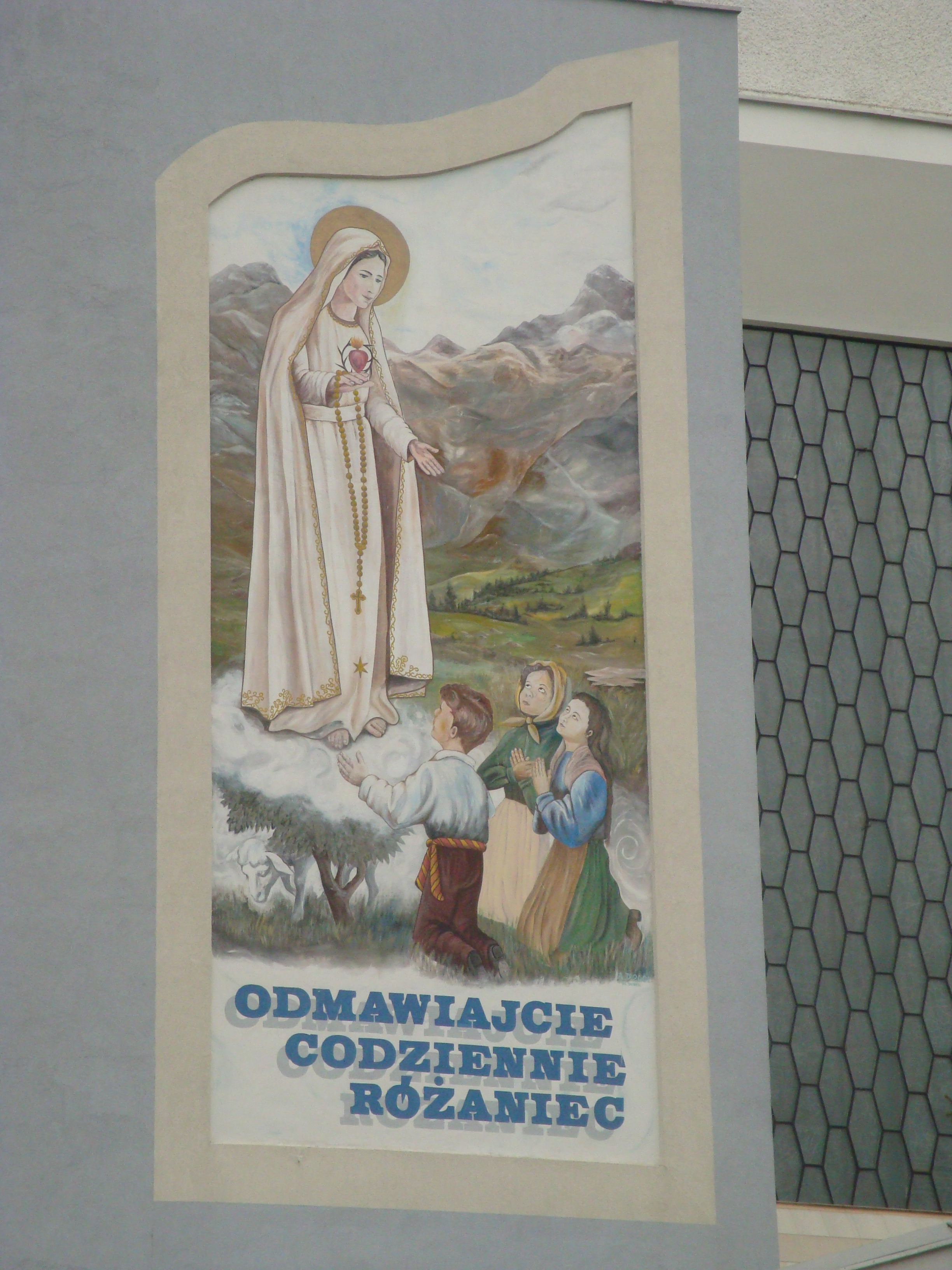 Kościół Matki Bożej Nieustającej Pomocy w Tarnobrzegu-Serbinowie